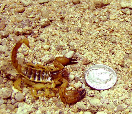 Scorpio maurus (Iraq)